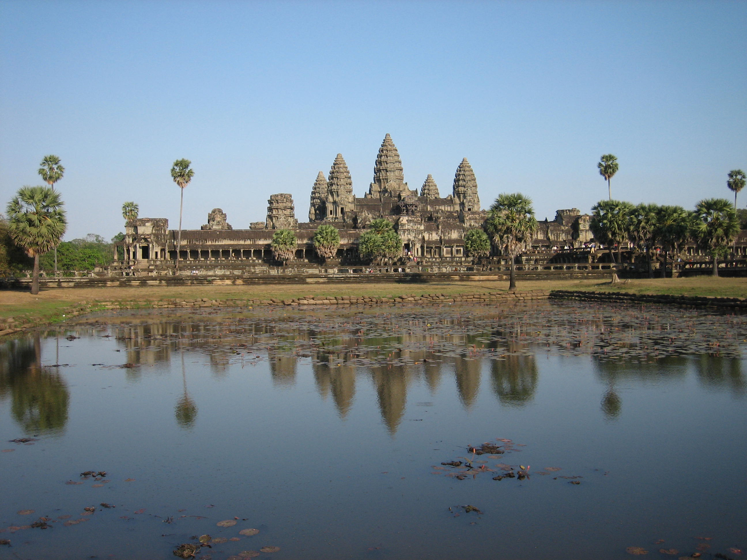 Angkor Wat